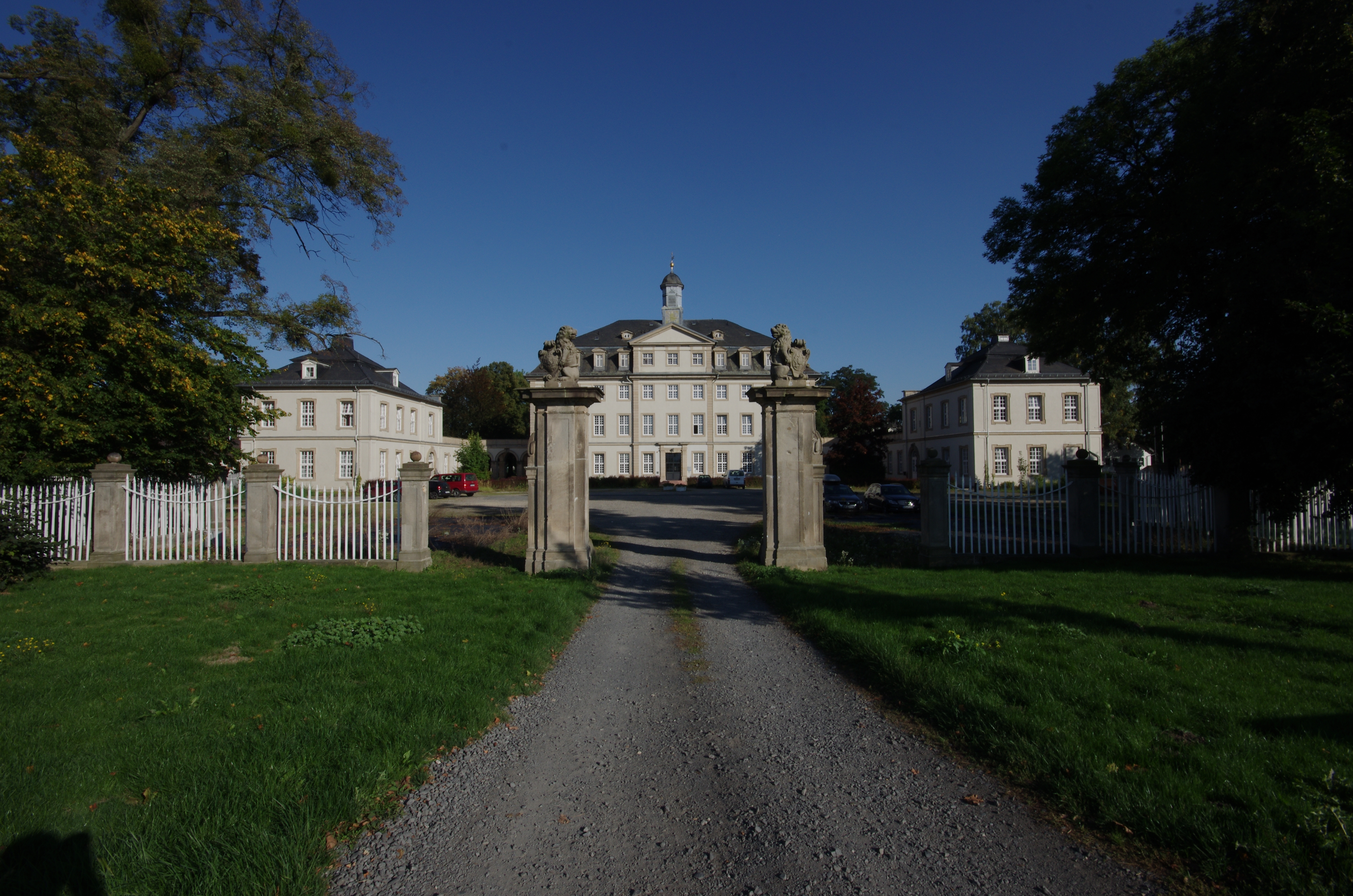 Wabern in Hessen. Das Schloß ist heute eine Erziehungsanstalt. Es befindet sich am Ortsrand von Wabern.